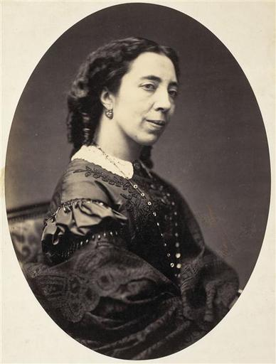 Musée d'Orsay Native nameMusée d'OrsayLocationParisCoordinates48° 51′ 36″ N, 2° 19′ 35″ E Established1986Web page control : Q23402 VIAF: 130307757 ISNI: 0000 0001 2157 2575 ULAN: 500310001 LCCN: n84128587 NLA: 36024323 WorldCat Pierre Petit (1831–1909) Alternative namesPierre PetitDescriptionFrench photographerDate of birth/death183216 February 1909Location of birth/deathAups, FranceParisWork period1848 – 1908Work locationFrance, New York (Statue of Liberty)Authority control : Q1981250 VIAF: 100987556 ISNI: 0000 0000 8008 6705 ULAN: 500028356 LCCN: n87810036 GND: 174256957 WorldCat épreuve sur papier albuminé Acquis par les Musées nationaux, 1981 Hauteur : 0.283 m Largeur : 0.216 m